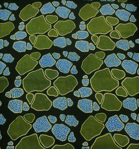 Batik Plumpungan merupakan salah satu produk batik yang berasal dari Kota Salatiga. Motif dari batik Plumpungan terinspirasi dari Prasasti Plumpungan, prasasti yang dianggap sebagai cikal bakal berdirinya Kota Salatiga. Adapun motif dasar dari batik Plumpungan sendiri adalah dua buah batu besar dan batu kecil dari bentuk Prasasti Plumpungan.